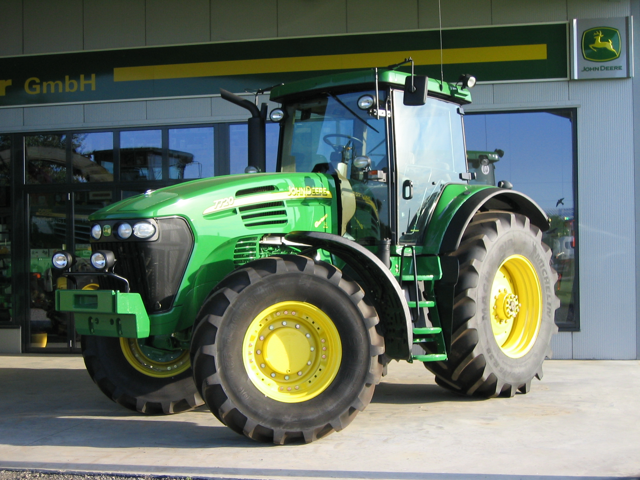 John Deere 7720, aufgenommen irgendwo zwischen Freiburg und Lahr